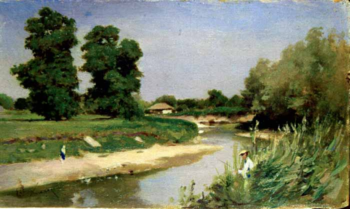 Peisaj cu râu şi copaci. Pictură de Theodor Aman.